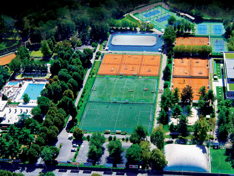 il Quanta Club sede dell'HC Milano Quanta